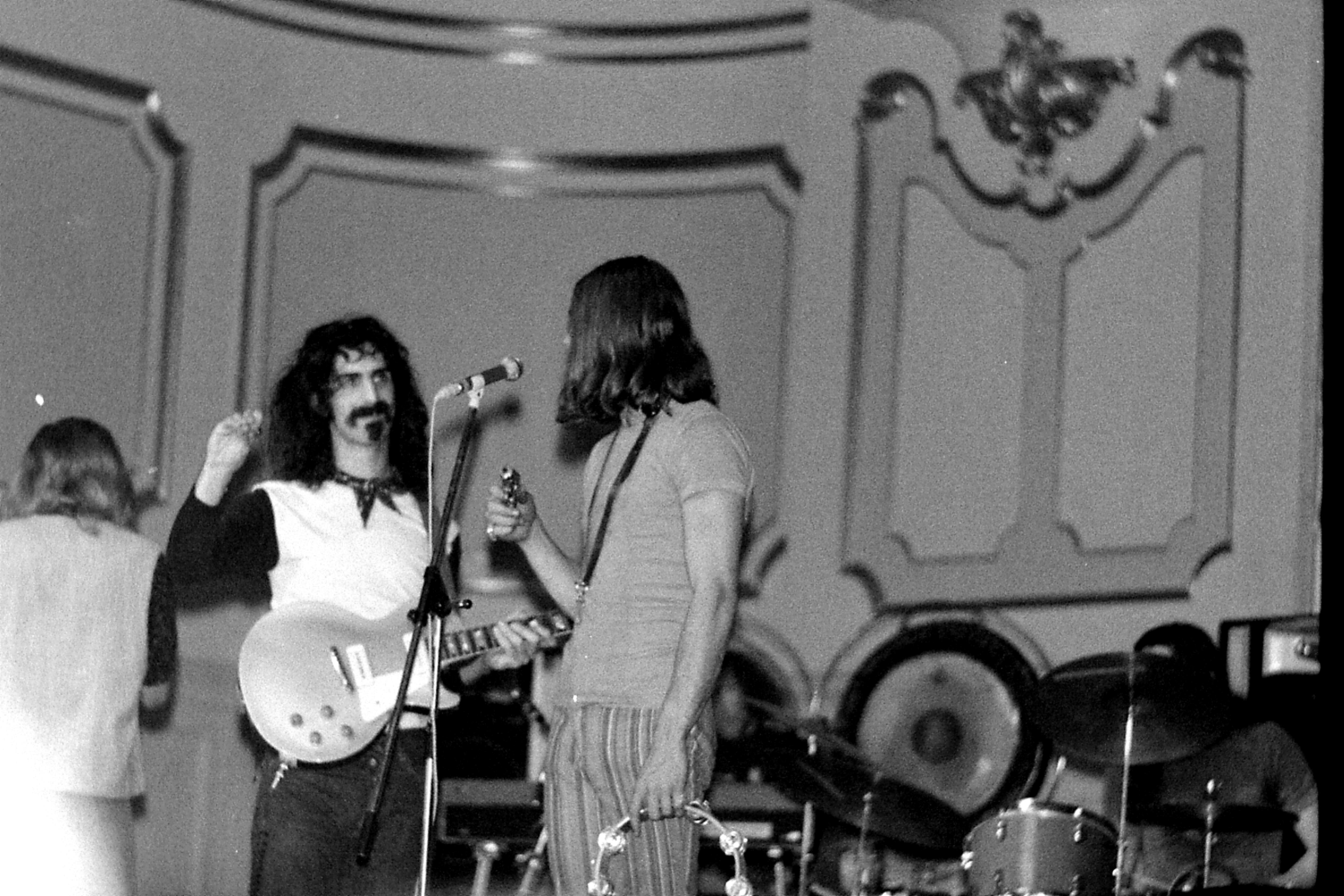 Konzert vom 05.10.1968 in der Hamburger Musikhalle, Scan vom Negativ.